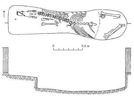 план поховання коня з кургану 9 Мар'ївка